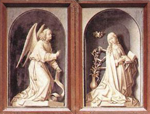 Das jüngste Gericht geschlossener Zustand - (The Last Judgement - closed)